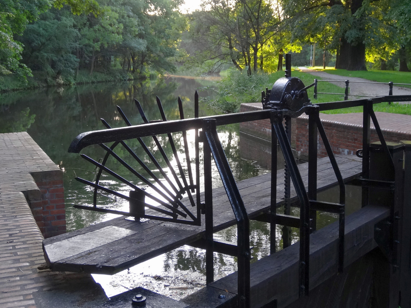 Śluza V przy ul. Czarna Droga w Bydgoszczy na Starym Kanale Bydgoskim